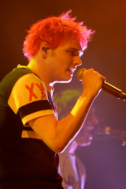 Gerard Way presentándose junto a My Chemical Romance en Montreal, Canadá, durante la gira Honda Civic Tour, el 16 de agosto de 2011.